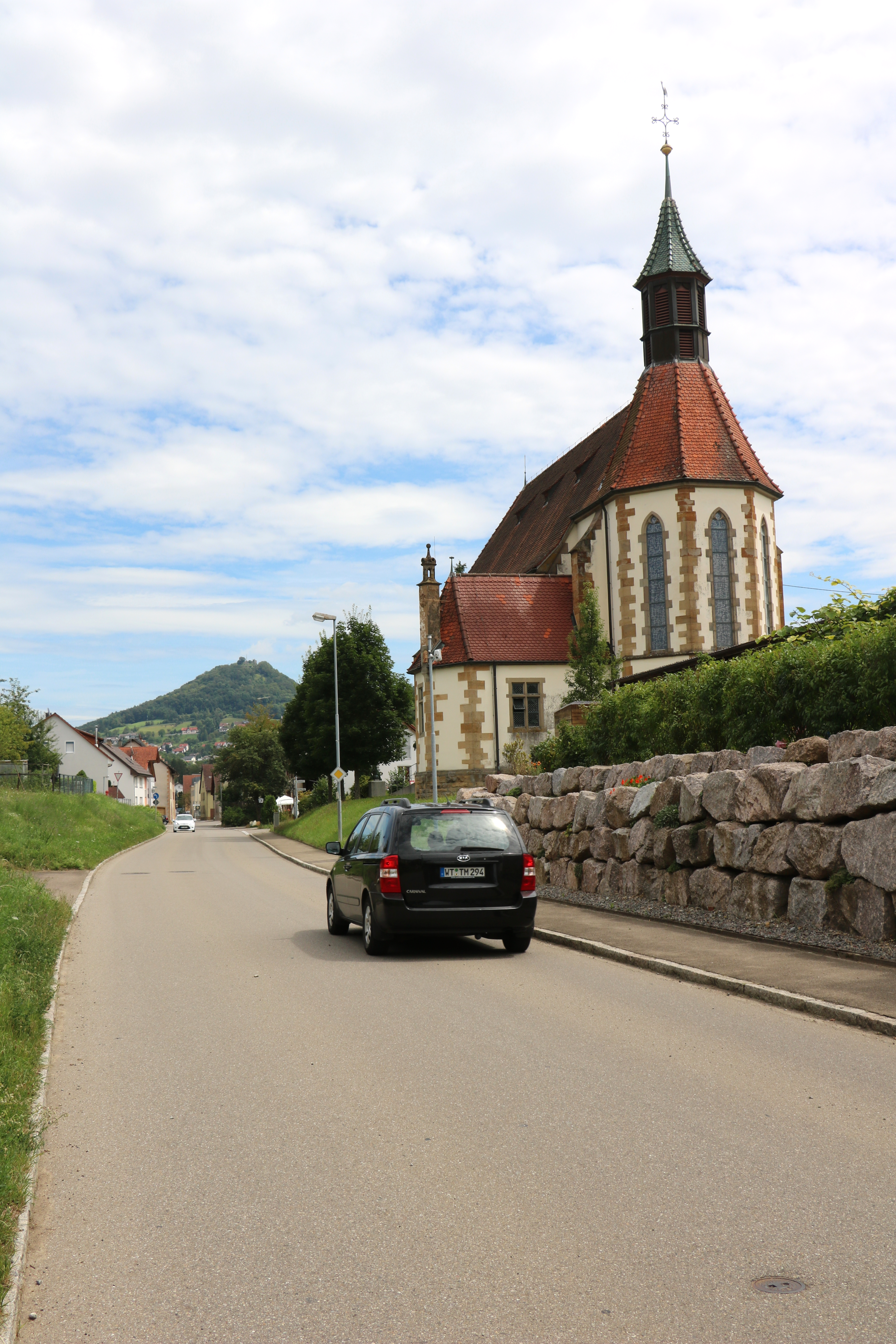 Dangstetten, Ortsteil der Gemeinde Küssaberg im Landkreis Waldshut in Baden-Württemberg. St. Annakirche, im Hintergrund die Küssaburg. Aufnahme 2015.